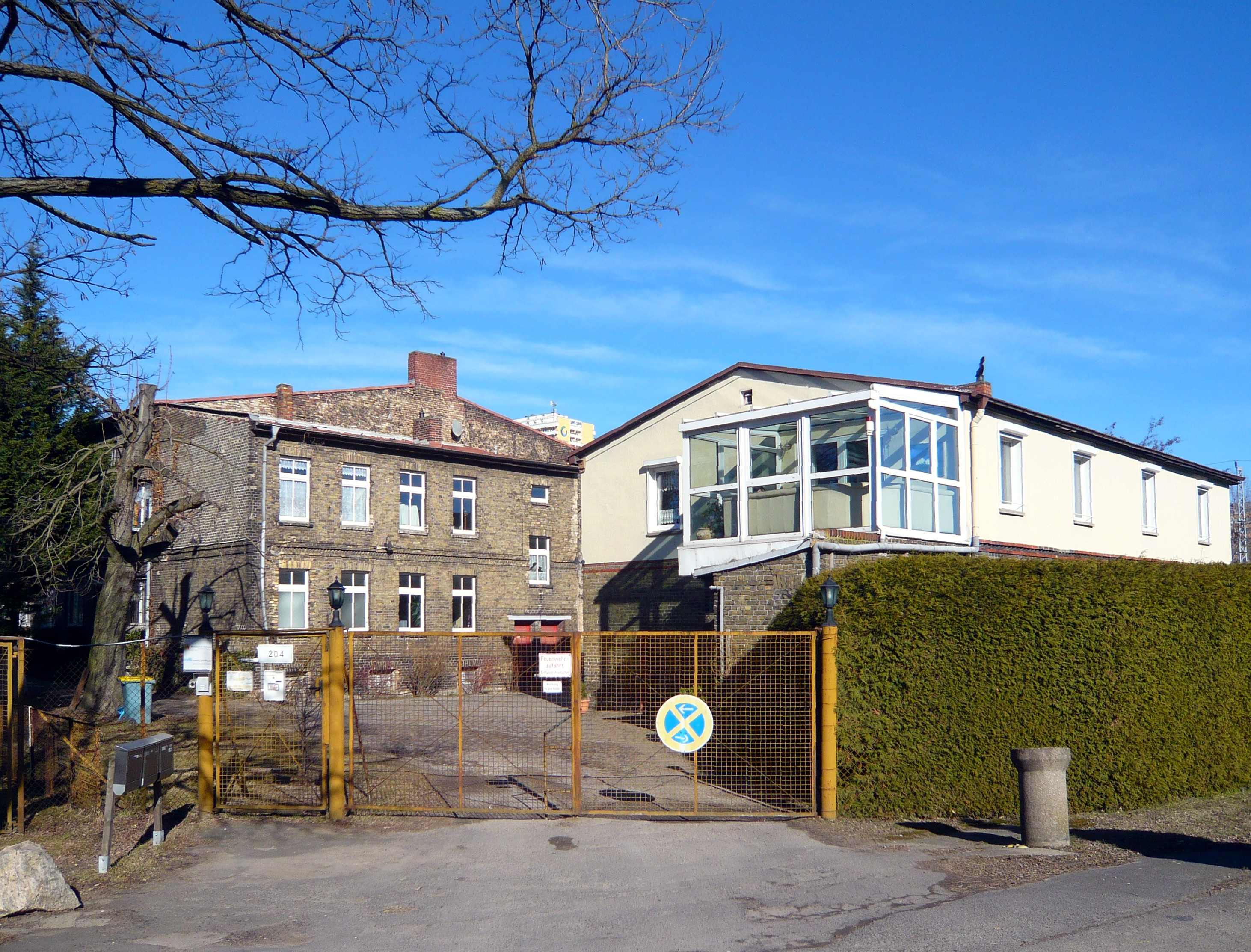 Ortsteil Berlin-Marzahn, Marzahner Chaussee: "Klostergarten"